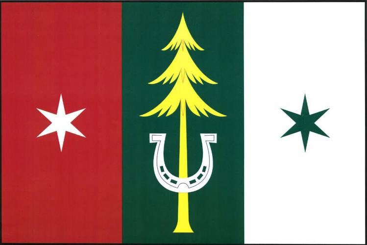 vlajka, Bušín, okres Šumperk